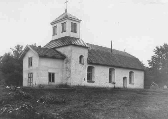 Dannäs kyrka